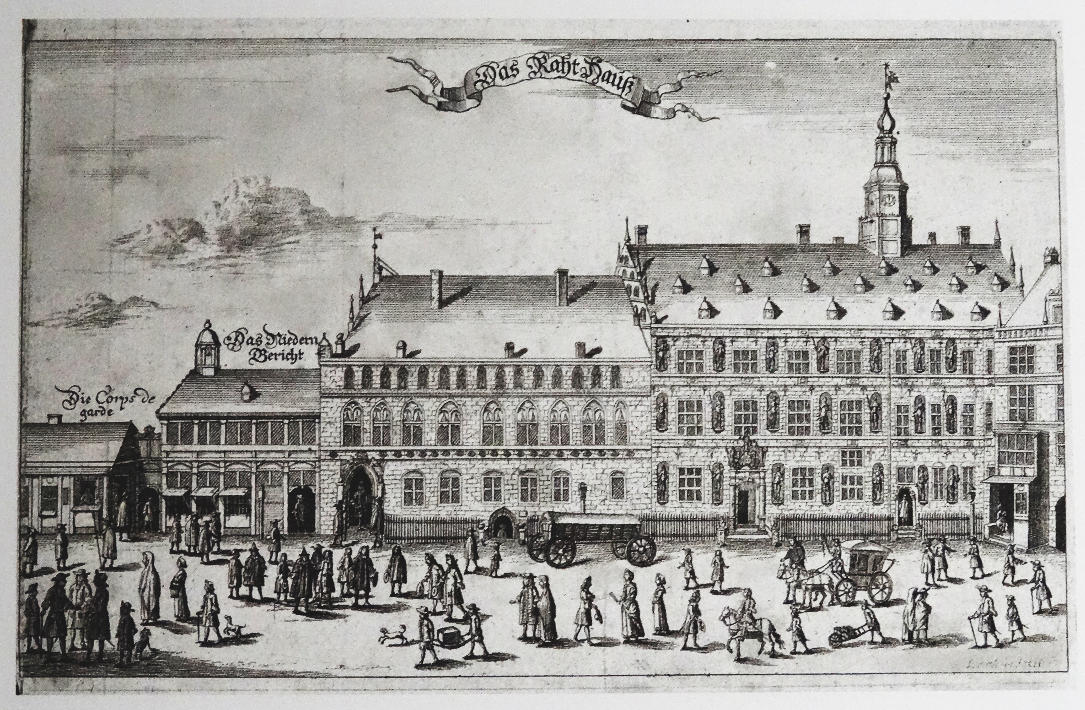 Stich von 1700 von dem alten Hamburger Rathaus, das 1842 dem Großen Brand zum Opfer fiel